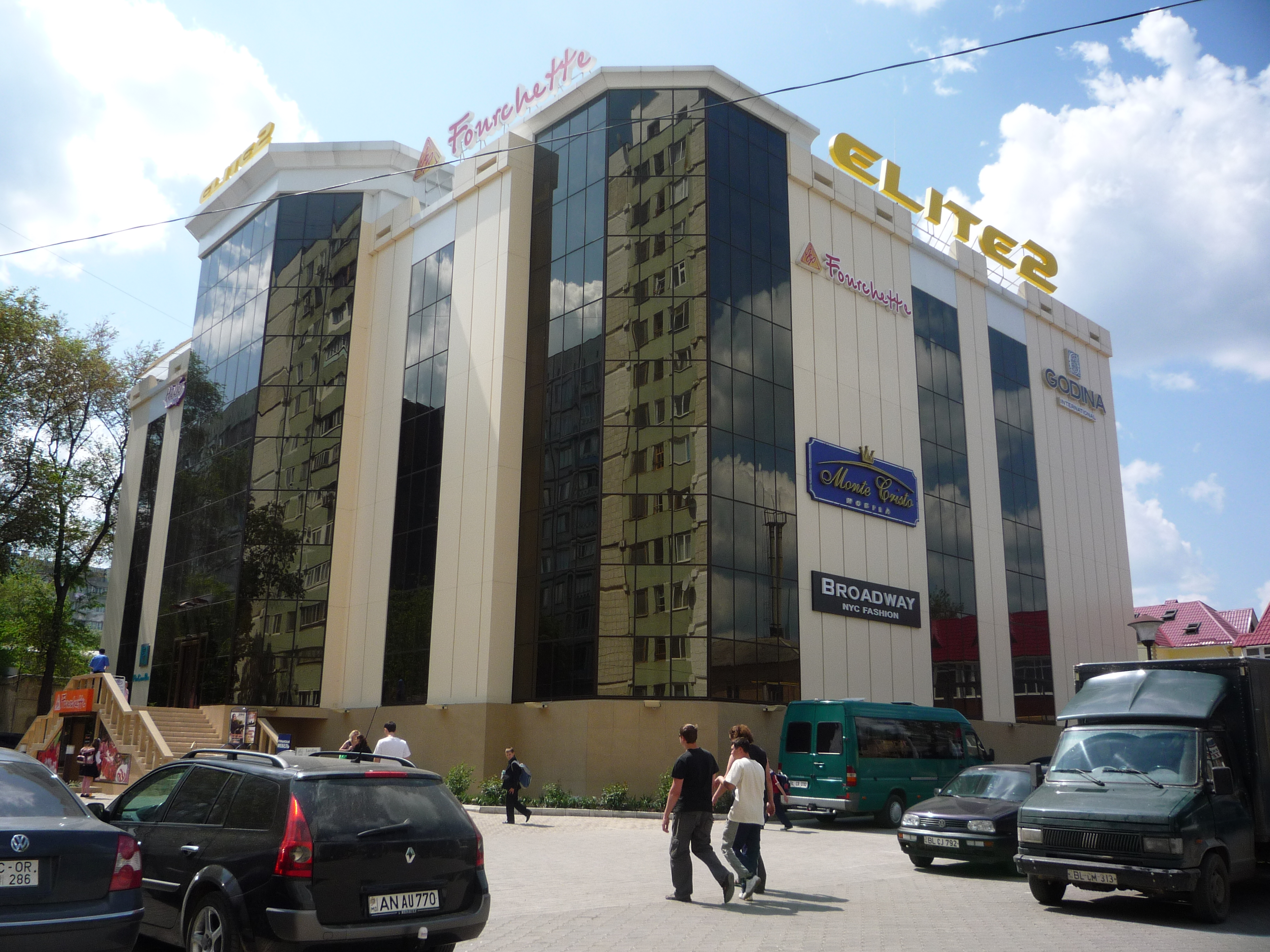 Centrul comercial